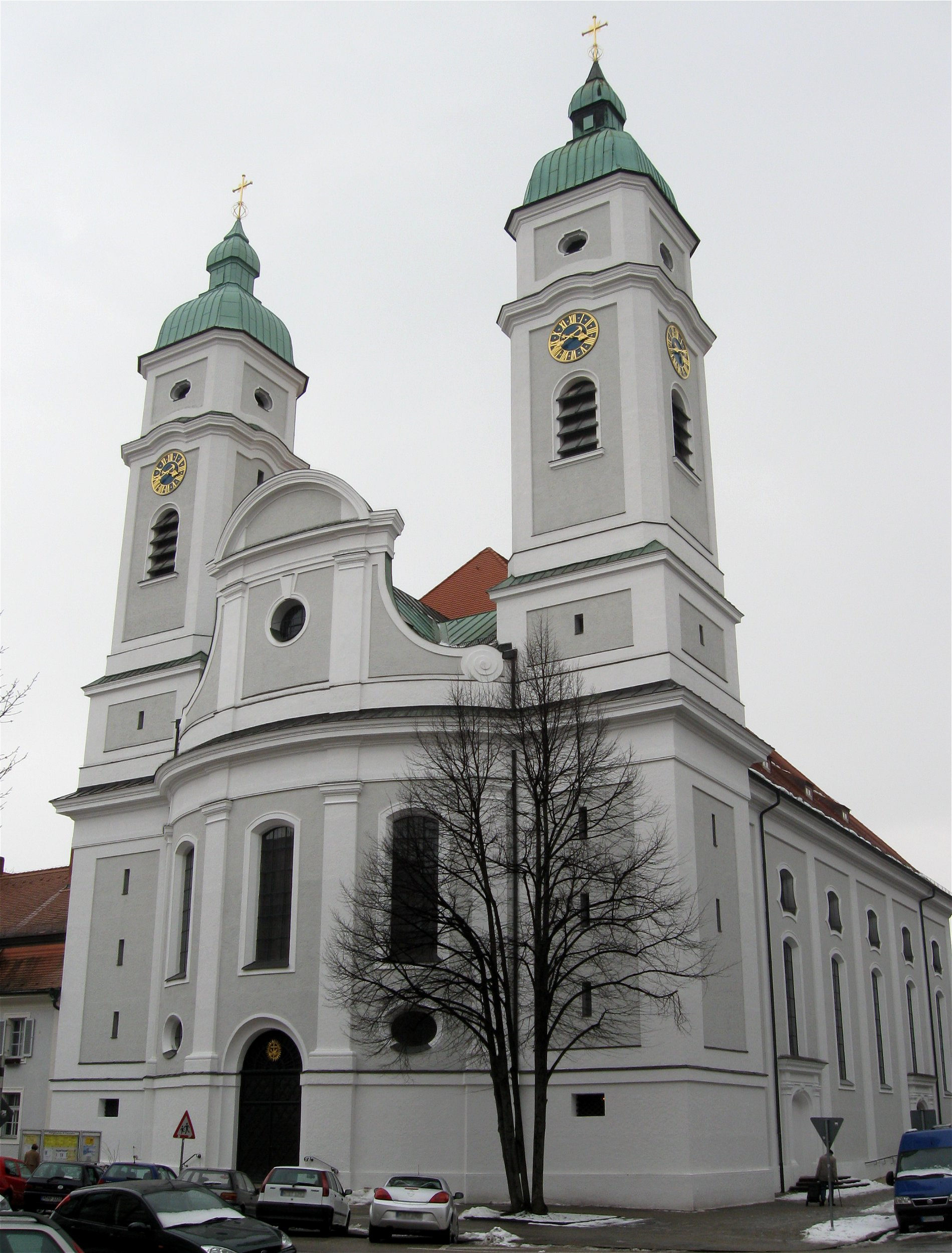 Hans-Mielich-Straße 14; Kath. Pfarrkirche St. Franziskus (München), zweitürmiger Neubarockbau, 1925-26 von Richard Steidle